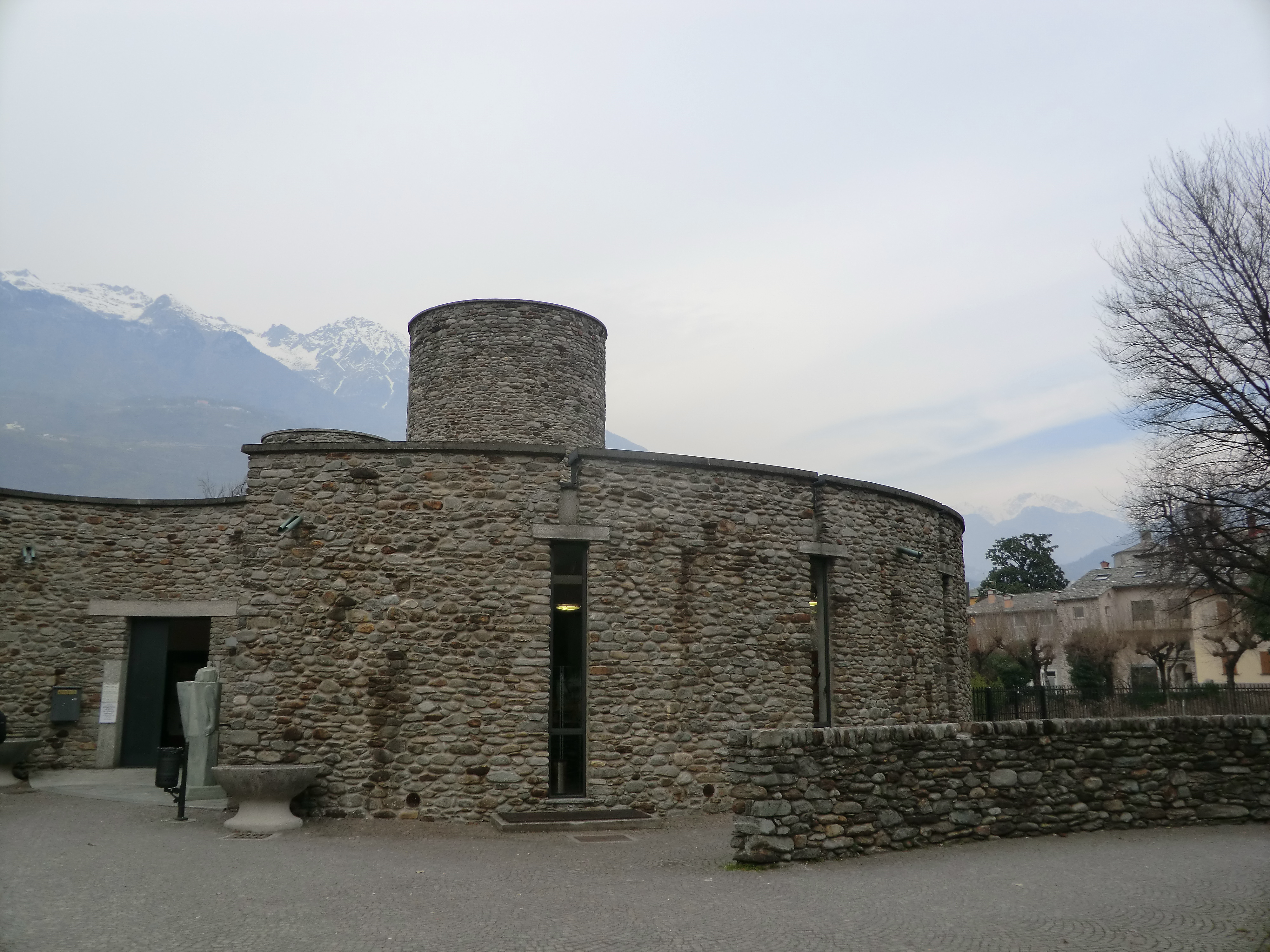 La Biblioteca Civica "Ezio Vanoni"